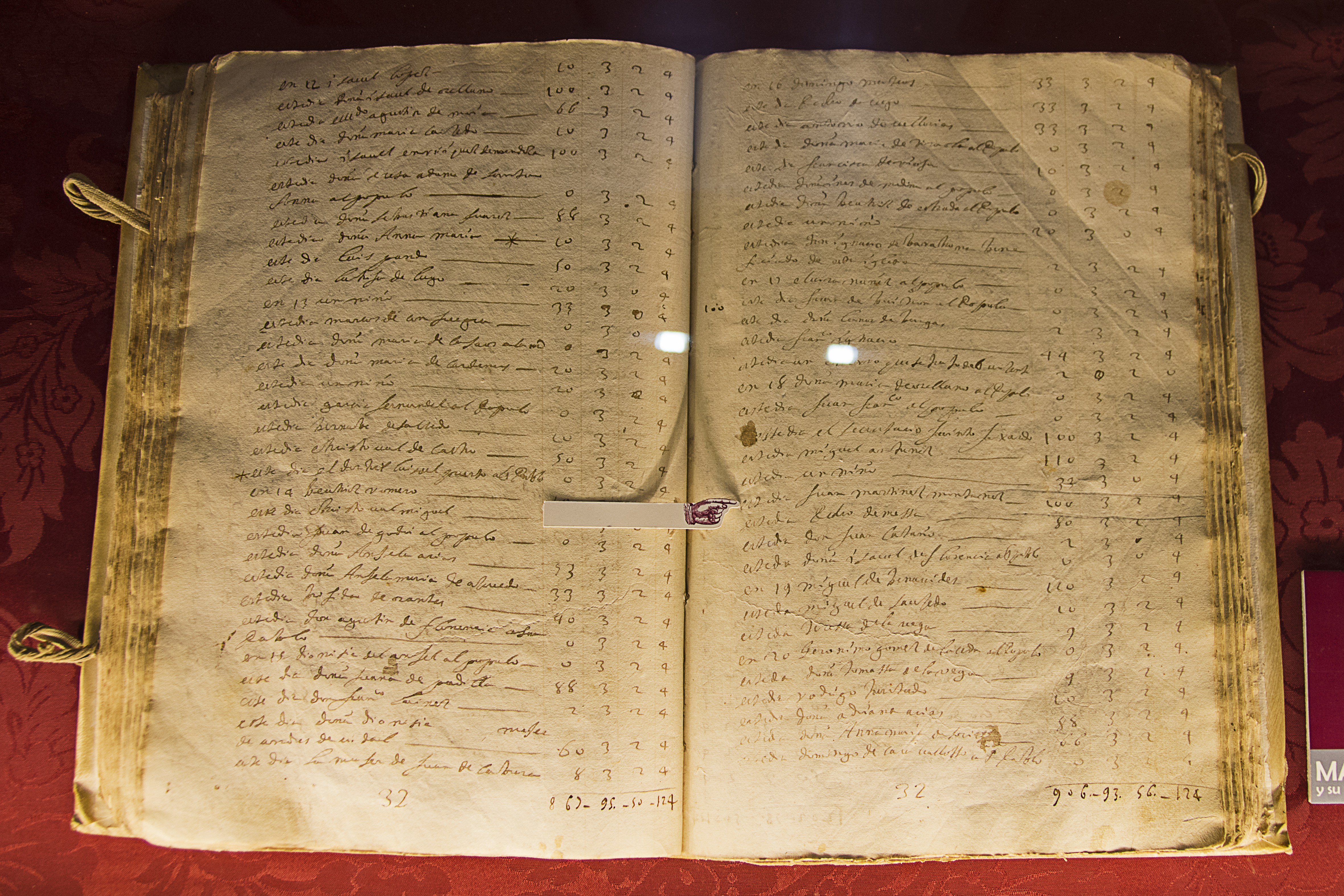 Asiento de entierros de Juan Martínez Montañés. Libro 2 de Defunciones (1624-1667) de la iglesia de la Magdalena de Sevilla. 18 de junio de 1649. "En este día, Juan Martínez Montañés. cien reales de sepultura, todas las campanas de doblar: cuatro ciriales y cruz".